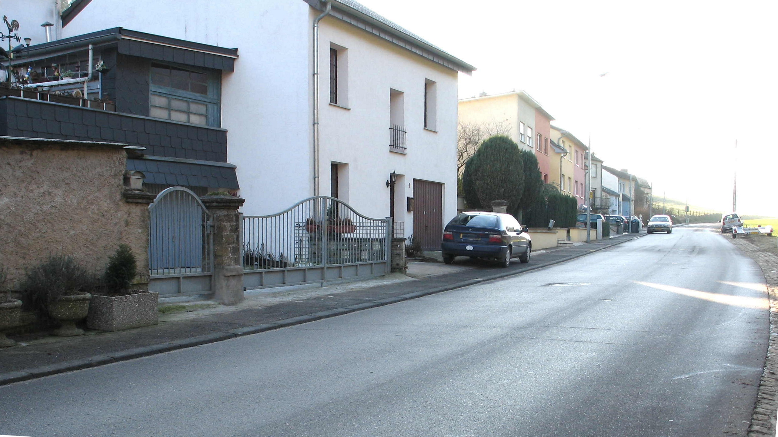 Birelergronn.